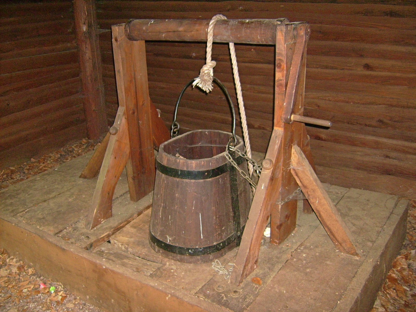 Eimer zum Wasserschöpfen im Bergwerk Düppenweiler